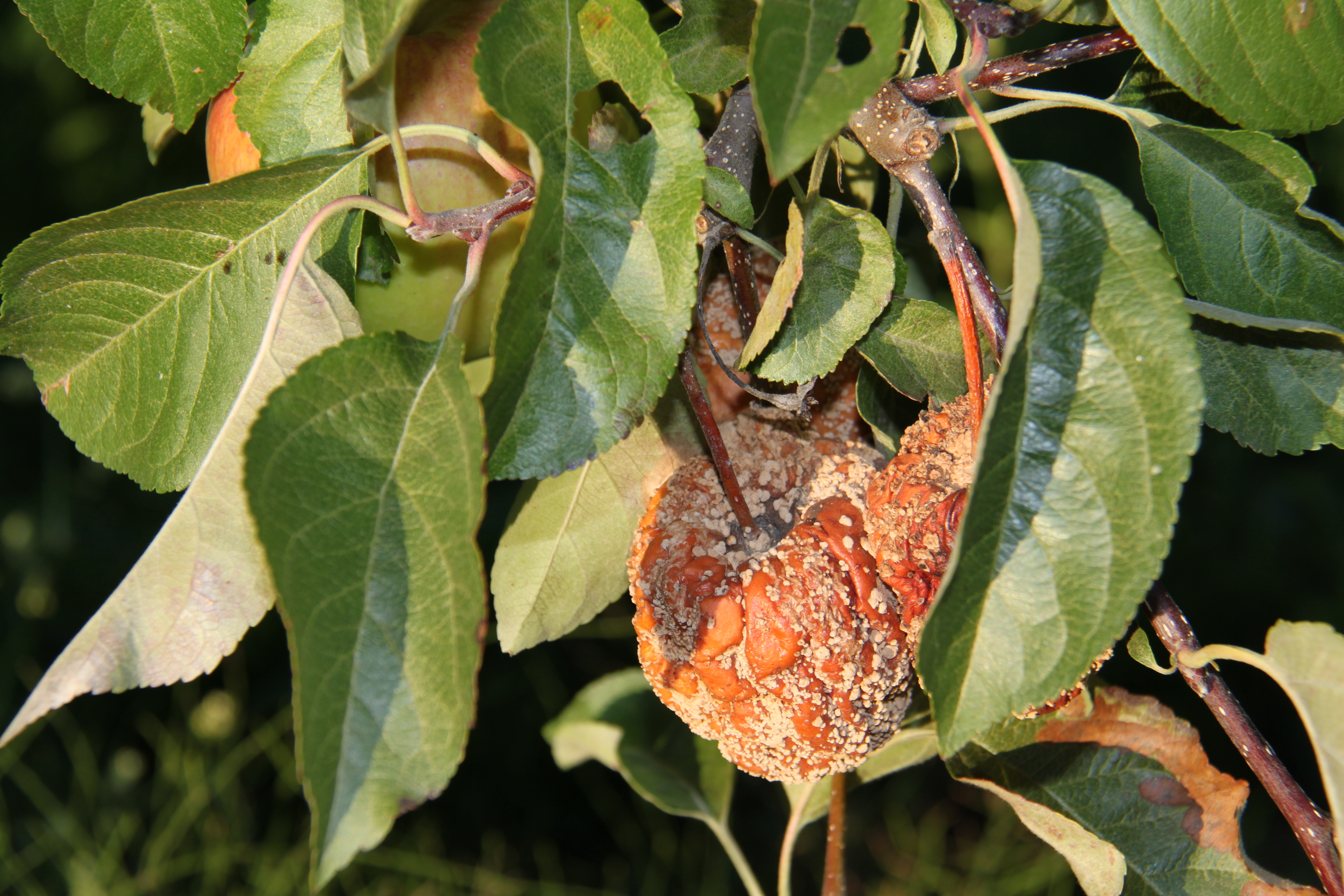 bereits am Baum verfaulter Apfel, gesehen in Apfelplantage bei Gelsdorf (Gemeinde Grafschaft, Rheinland-Pfalz)